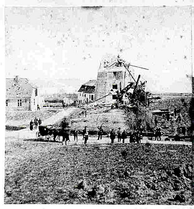 Die zerstörte Mühle bei den Düppeler Schanzen am 18. April 1864 (zwei Tage nach der Erstürmung der Schanzen) Fotograf Friedrich Brandt (Fotograf) (1823-1891) [1] Public Domain 11:07, 29. Mär 2004 Arne List 400 x 430 (58979 Byte) (Foto von 1864)